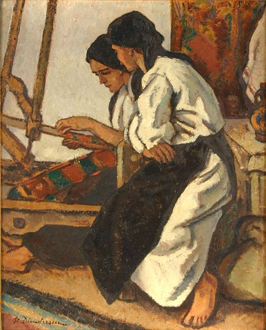 Femei ţesând la război - Muzeul de Artă din Cluj-Napoca, ulei pe carton, 0,600 X 0,490, semnat dreapta jos cu negru: At. Dimitrescu, nedatat.